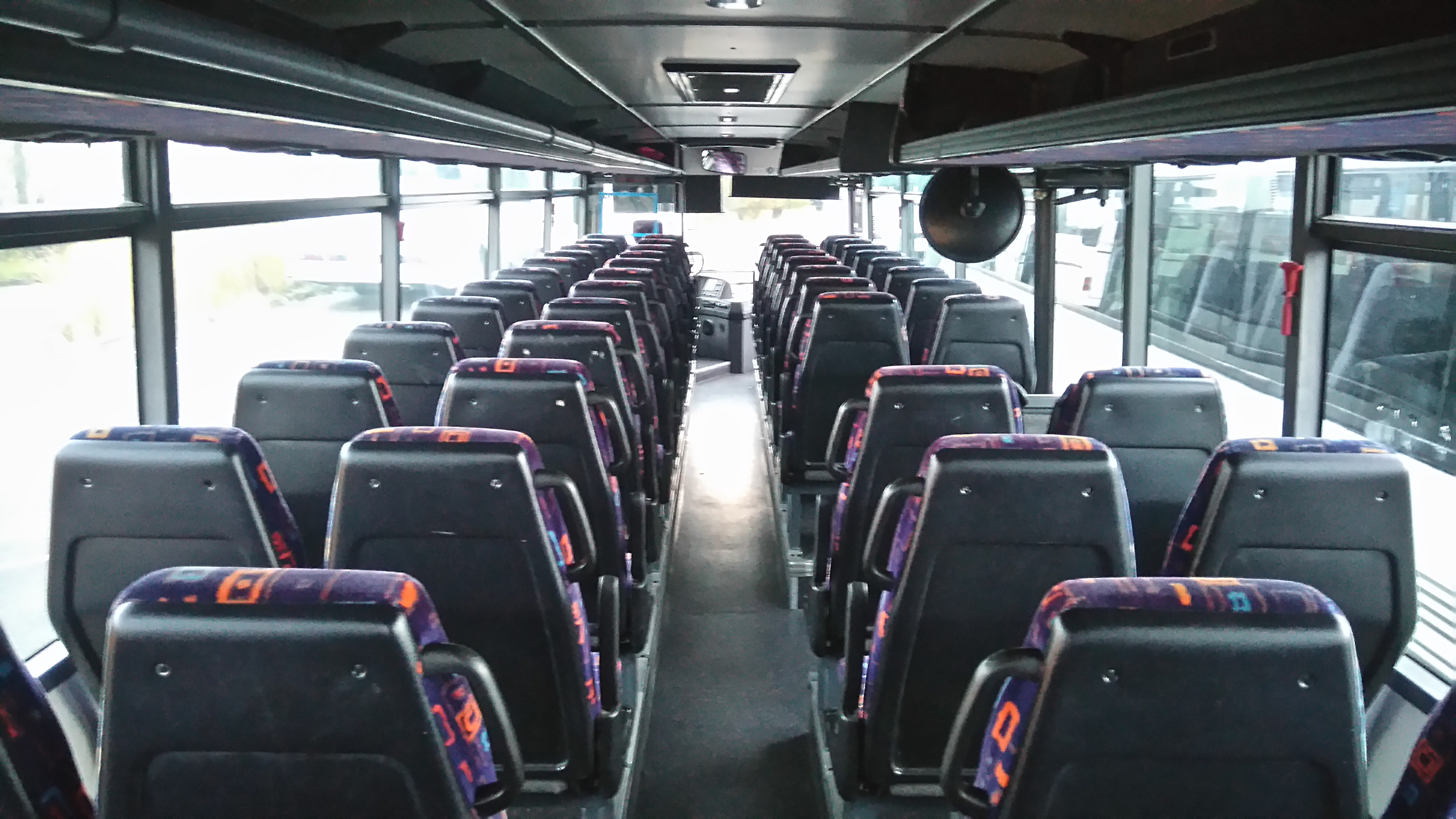 Irisbus Axer 12M